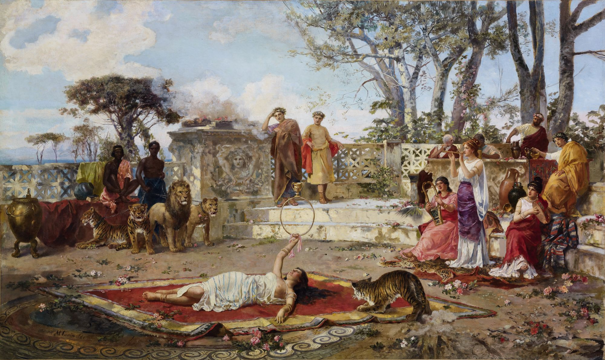 Antike Szene (mit Dompteuse), Italien, 19. Jh.